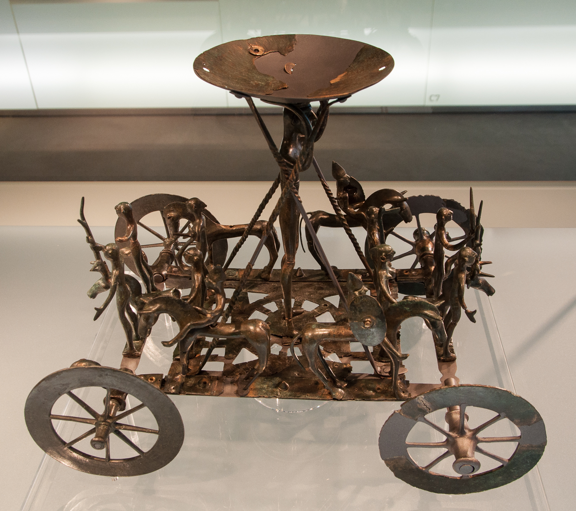 Der Kultwagen von Strettweg im Archäologiemuseum in Graz, Österreich.